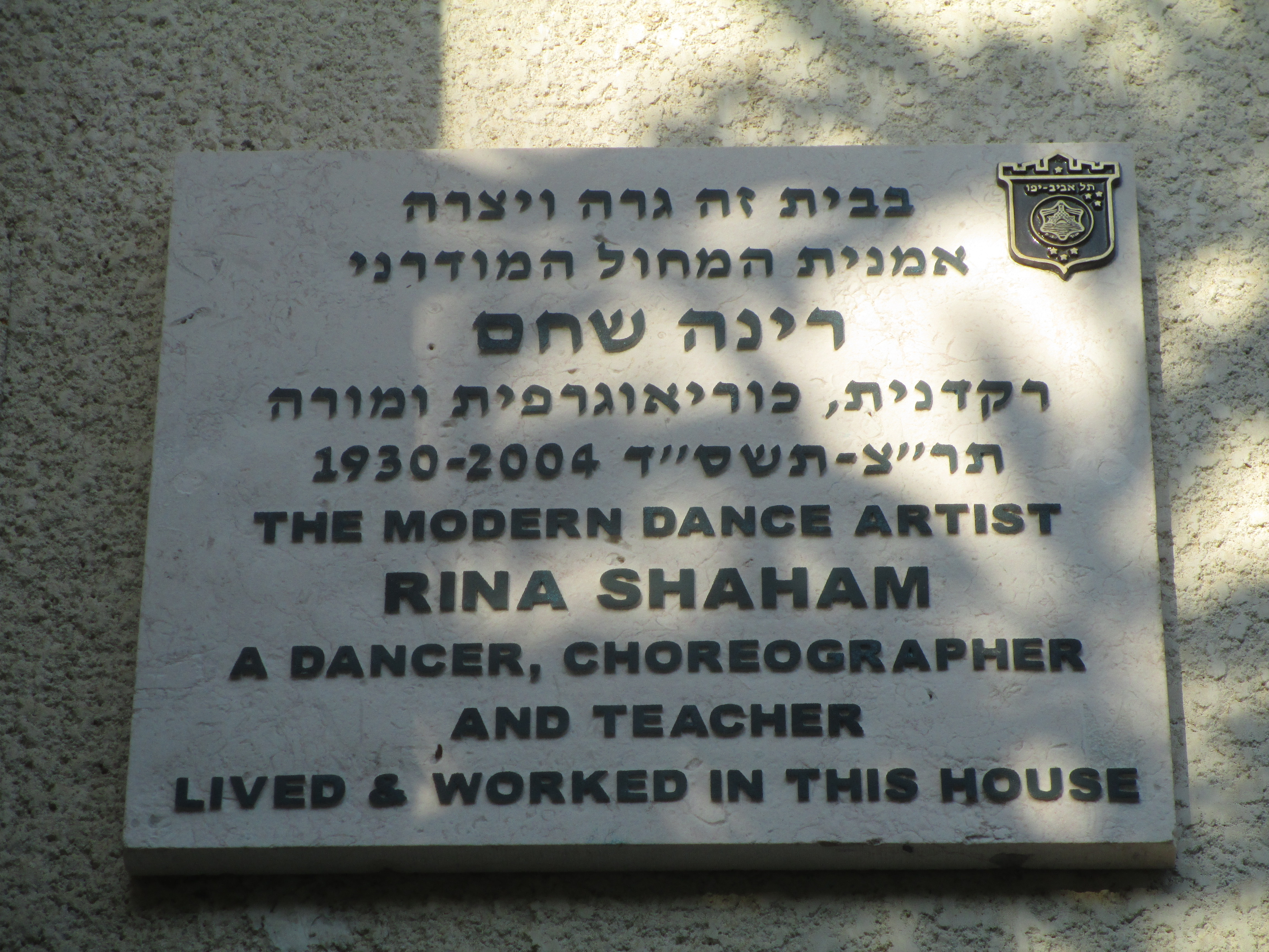 לוחית זיכרון לרקדנית רינה שחם ברחוב דה האז 14 בתל אביב